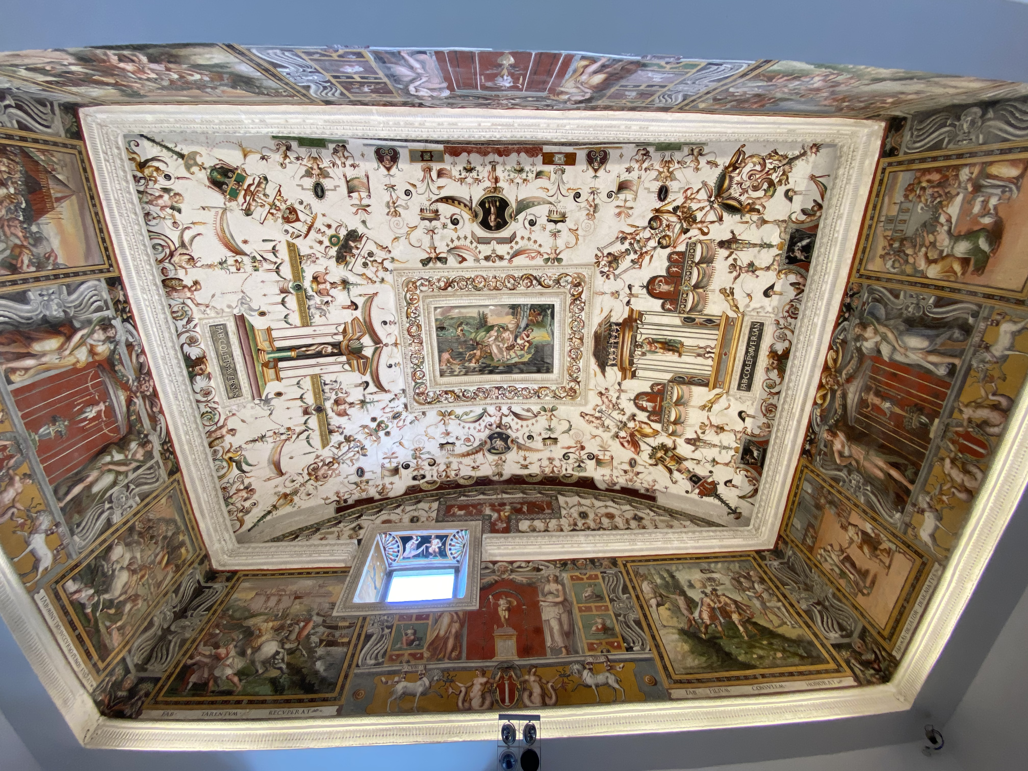 Abbazia di Grottaferrata